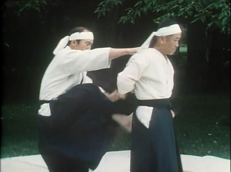 拳で打ってくる敵右手首を左手で掴み、背後に廻り肘の逆関節を取ってねじり上げ、右手で敵の襟を掴み、右足で腰を蹴り上げて倒す技。